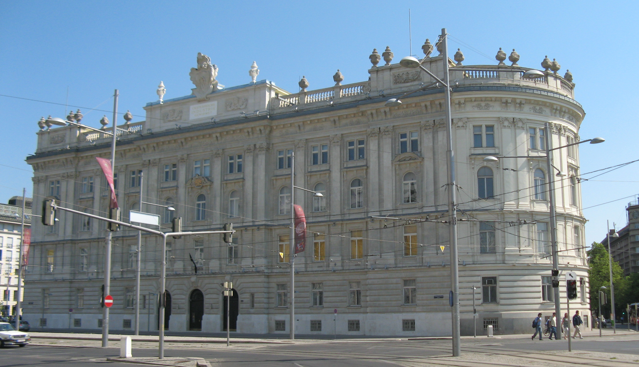 Haus der Industrie in Wien-Landstraße